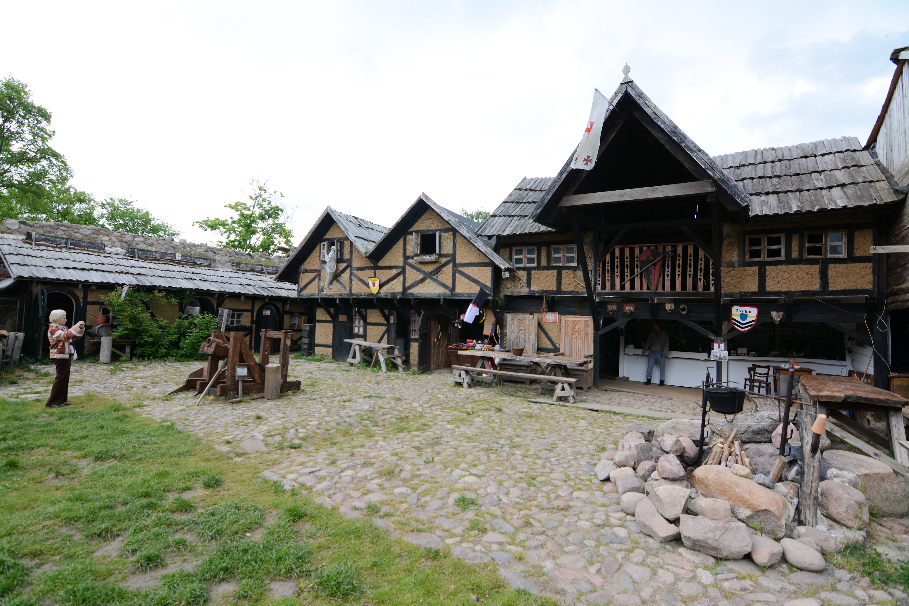 Dziedziniec zamku Drahim w Starym Drawsku